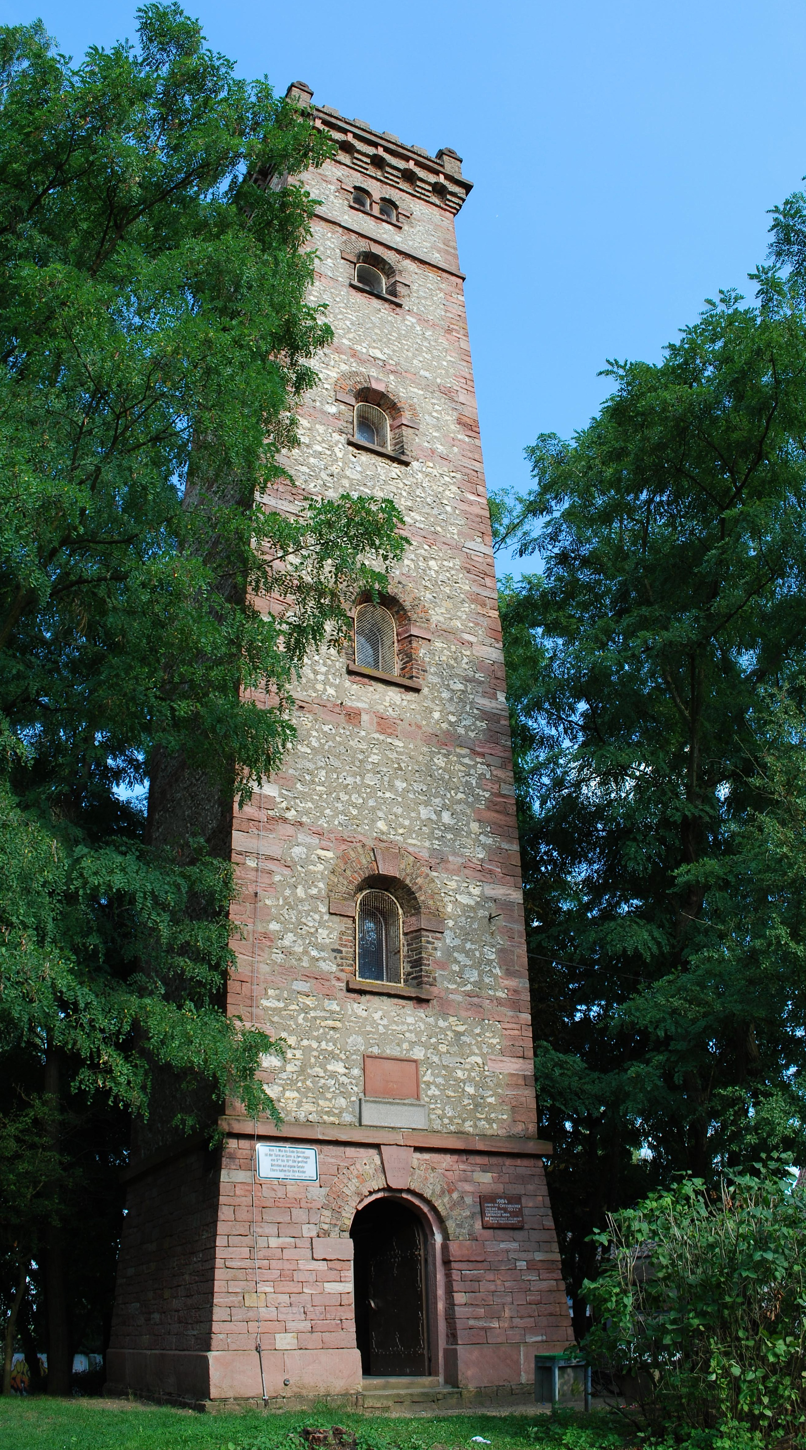 Der 24 Meter hohe Bieberer Aussichtsturm in Offenbach-Bieber. Er wurde 1882 erbaut und ist von Anfang Mai bis Ende Oktober an Sonn- und Feiertagen geöffnet.